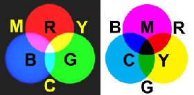 RGB- ja CMY-värinmuodostus perustuu näköjärjestemän kolmivärikanavaiseen toimintaan.